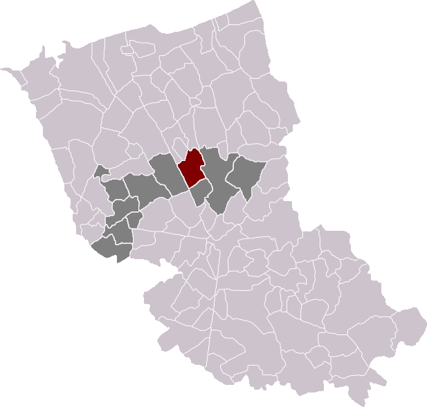 Locatie gemeente Ekelsbeke in arrondissement Duinkerke. Zelfgemaakt. Location of Esquelbecq municipality in the arrondissement of Dunkirk. Self made. Localisation de la commune d'Esquelbecq dans l'arrondissement de Dunkerque. Fait moi-même.